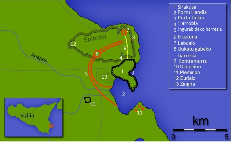 Atenastarrek Sirakusari jarritako setioa